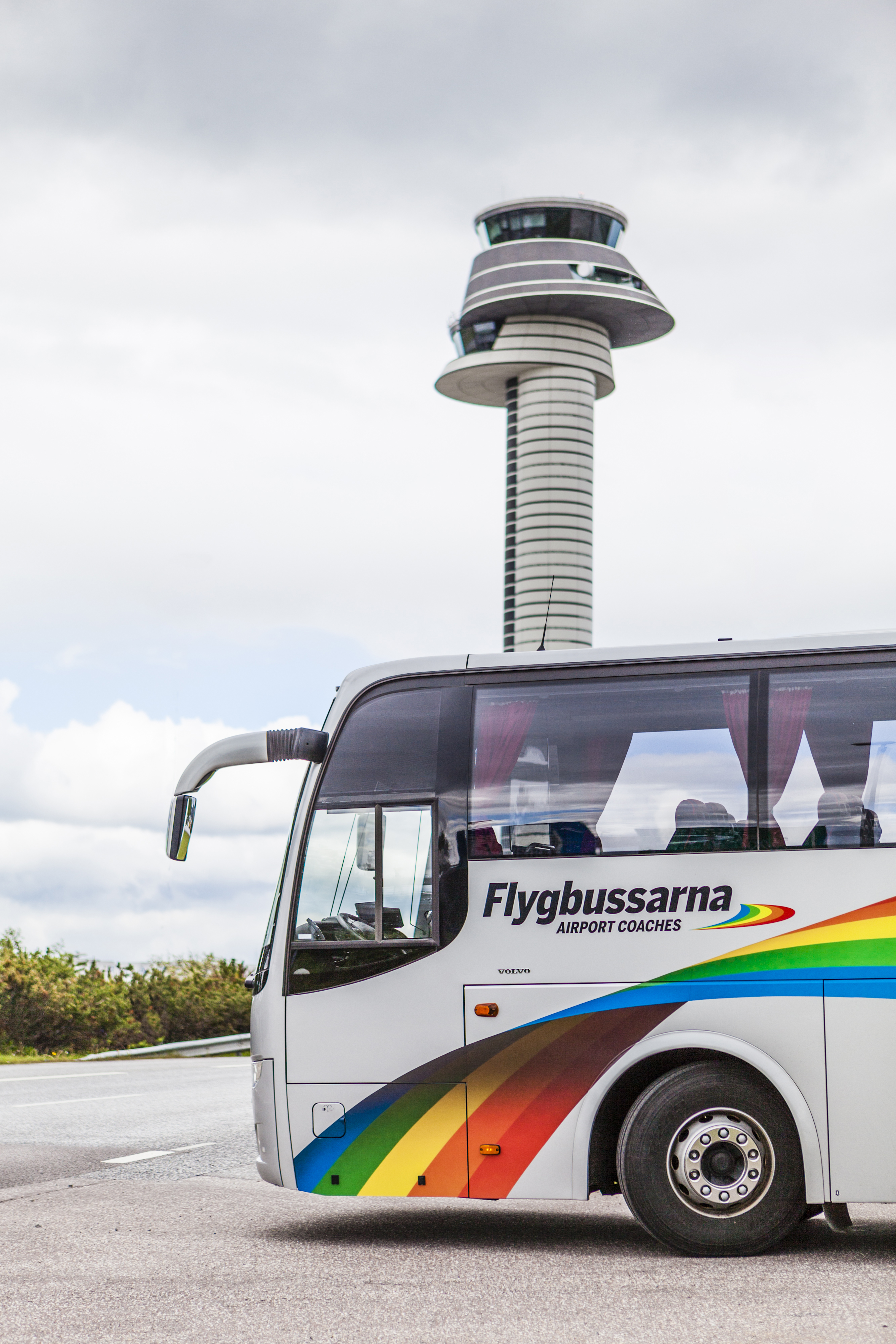 Flygbuss från Flygbussarna Airport Coaches vid tornet på Arlanda flygplats.